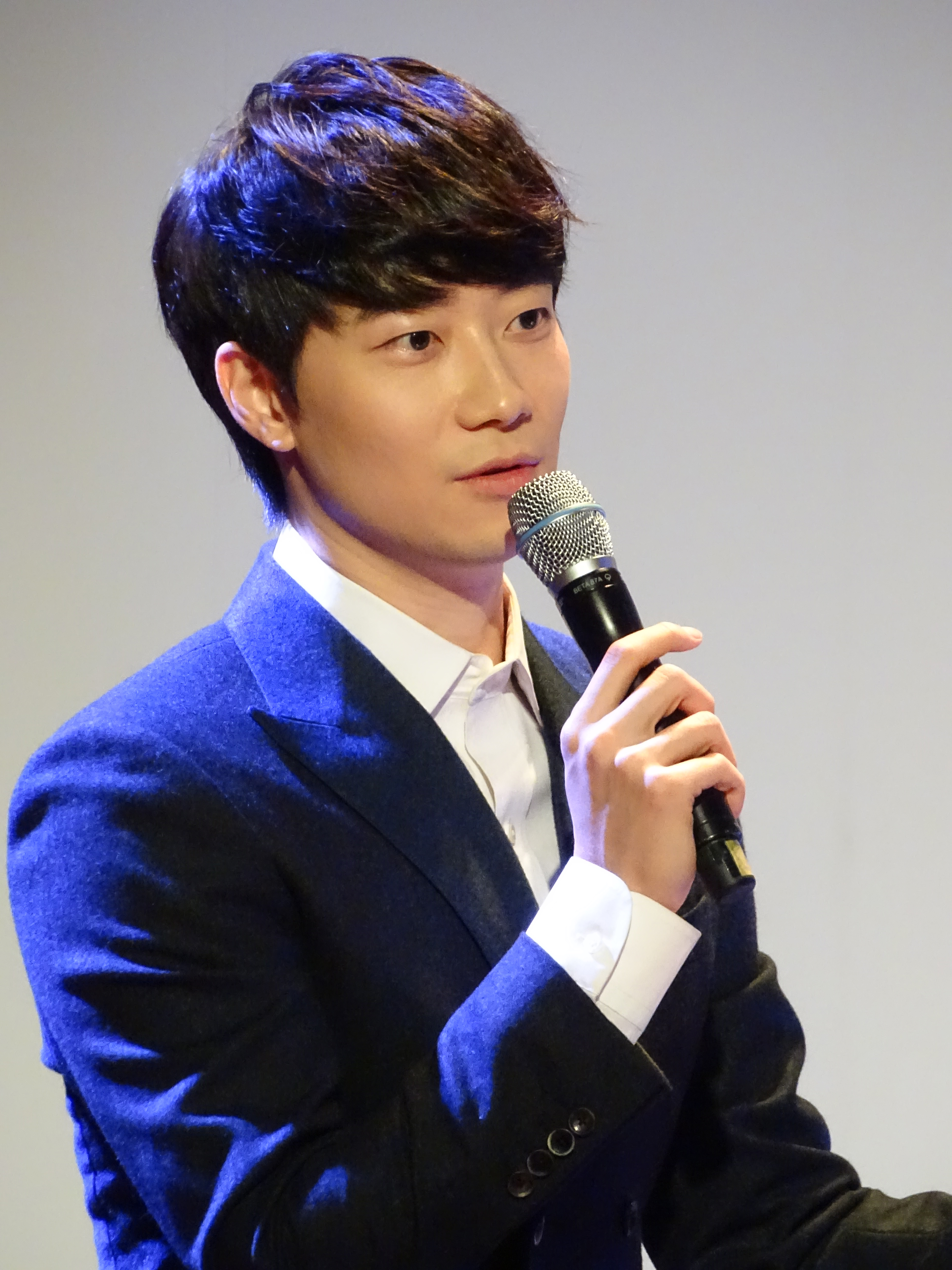 2014년 11월 26일 신세계백화점 본점에서 열린 콘서트 ‘윤한 시네마 콘서트’에서 피아니스트 윤한이 관객들에게 이야기하고 있다.